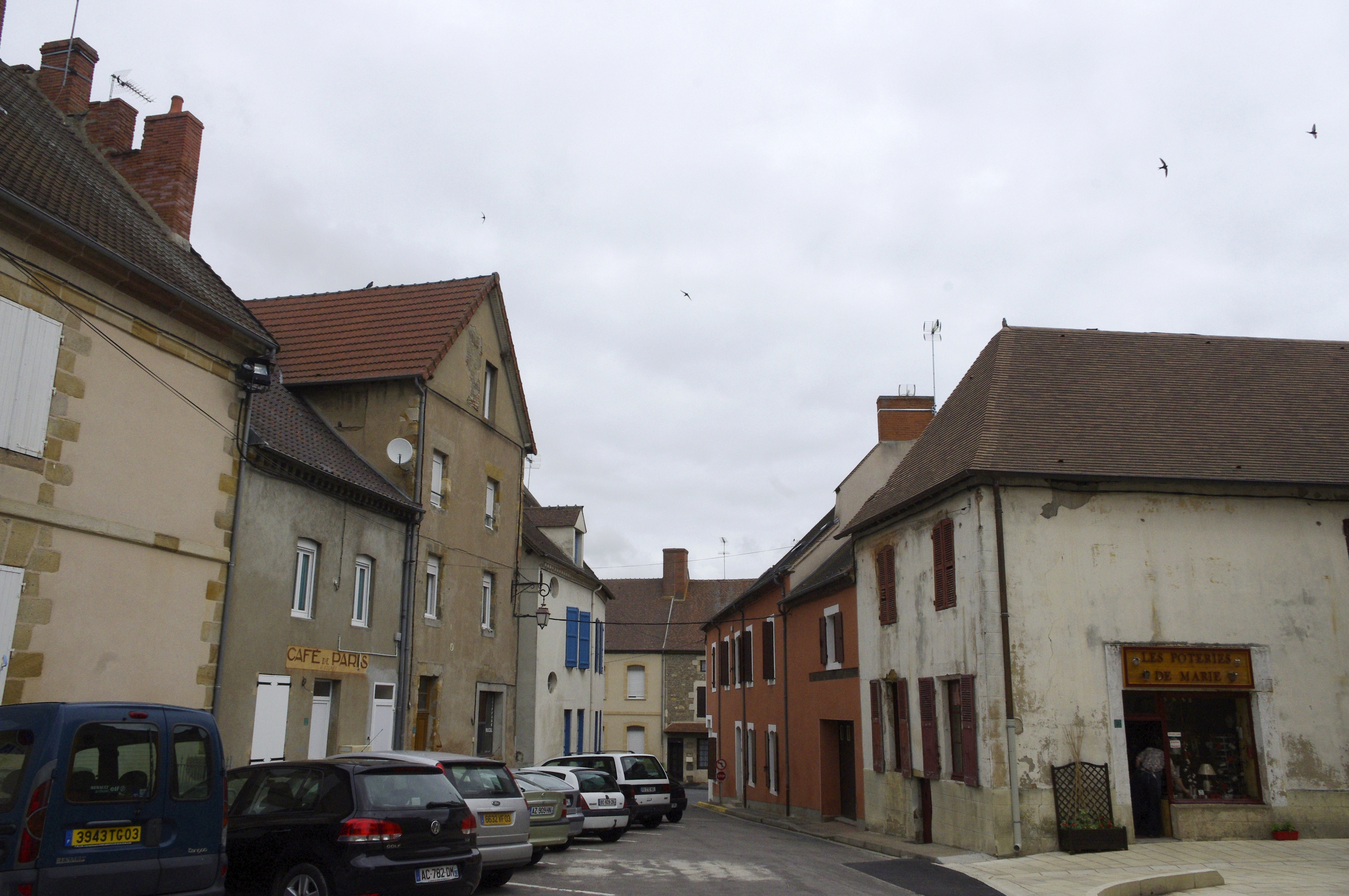 Rue à côté de l'église à Montmarault, Allier, France